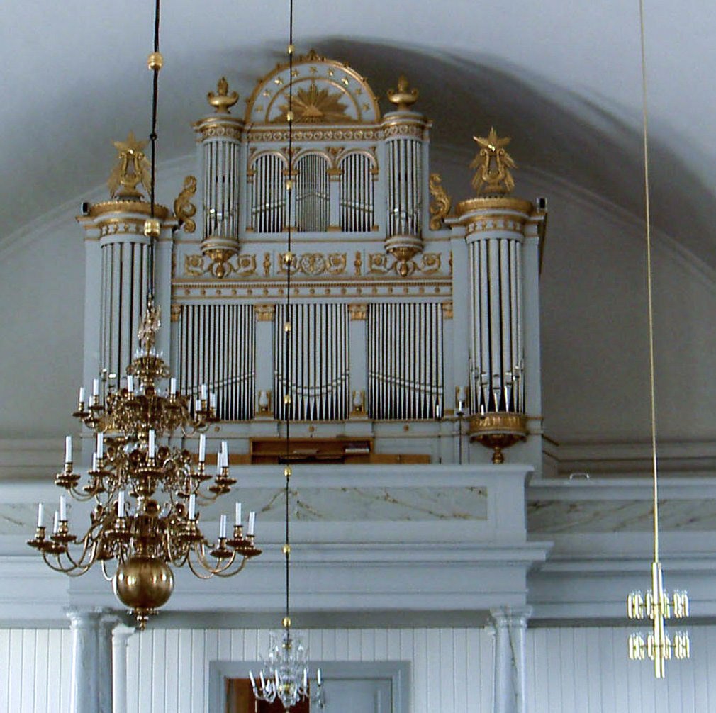 Orgeln.